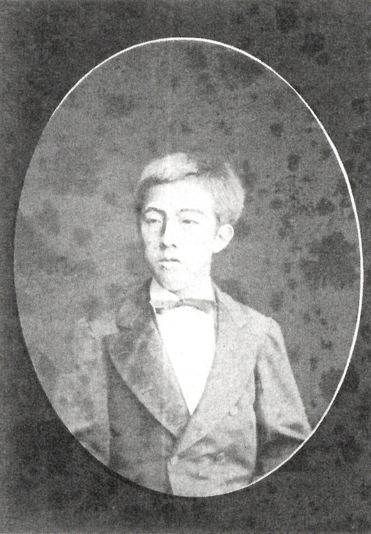 鳥取池田家13代当主池田輝知の肖像写真。